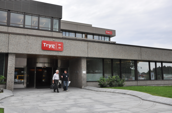 Trygs hovedkontor i Bergen, Fyllingsdalen.